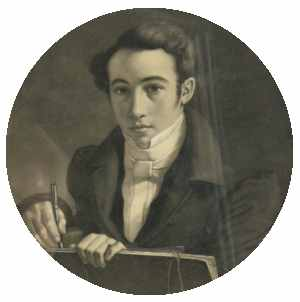 Self-portrait